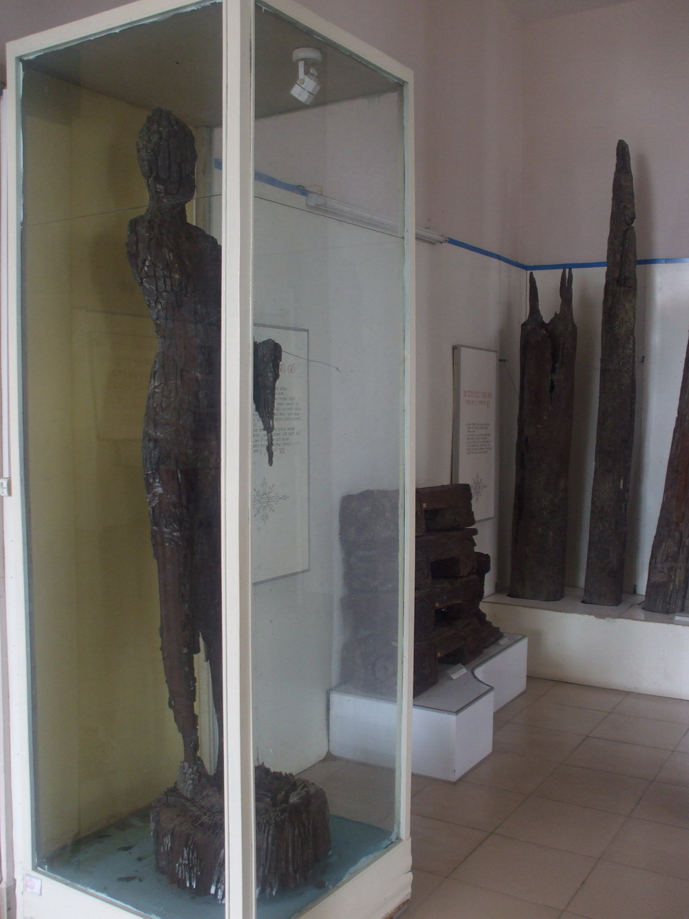 Tượng Phật bằng gỗ thời Phù Nam, hiện được trưng bày tại Bảo tàng An Giang.